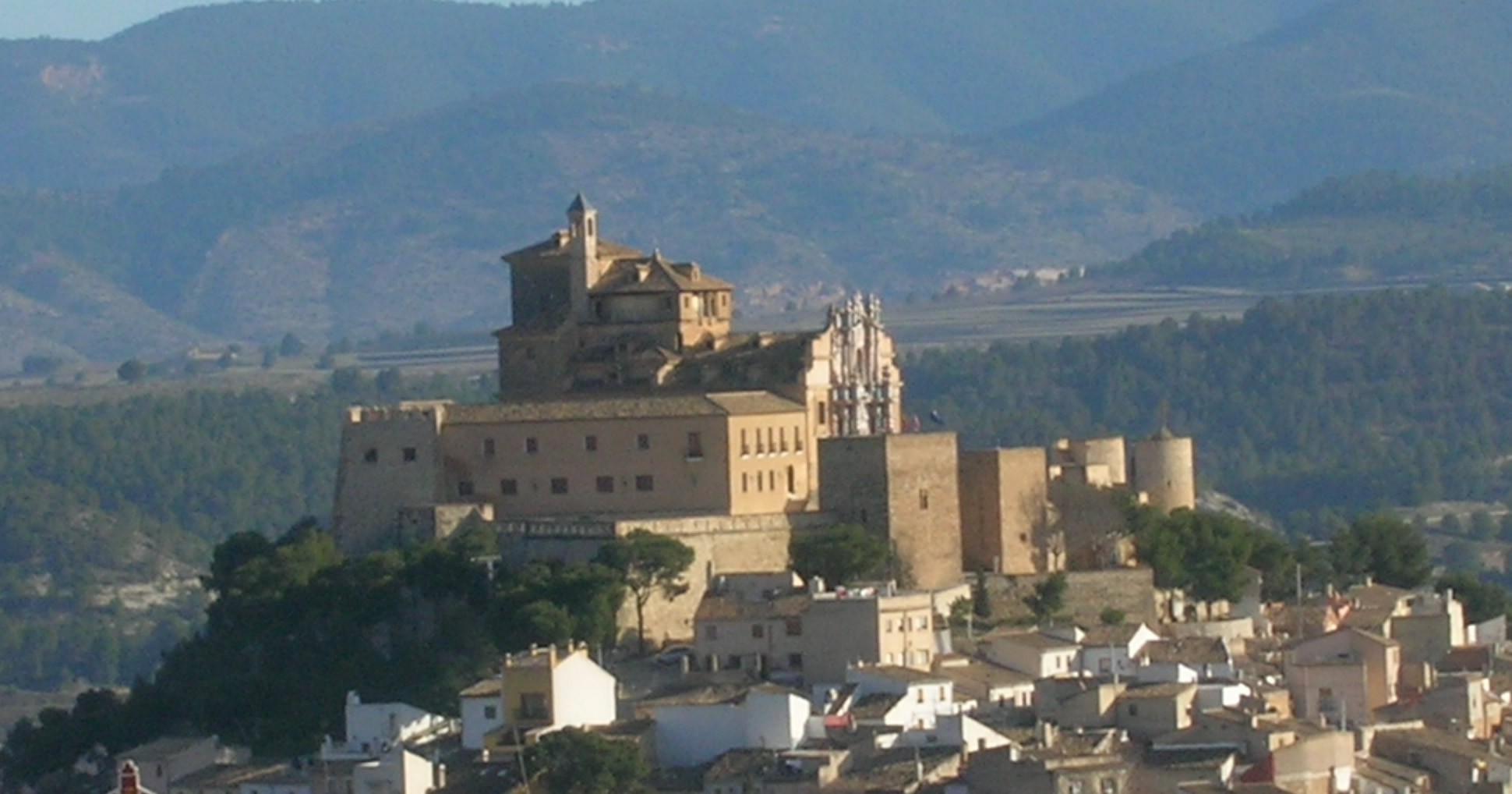 Castillo santuario de la Vera Cruz, en Caravaca de la Cruz, Murcia, España. Castle and church of the Vera Cruz ('authentic cross'), at Caravaca de la Cruz, Murcia, Spain. Own picture, given to PD.